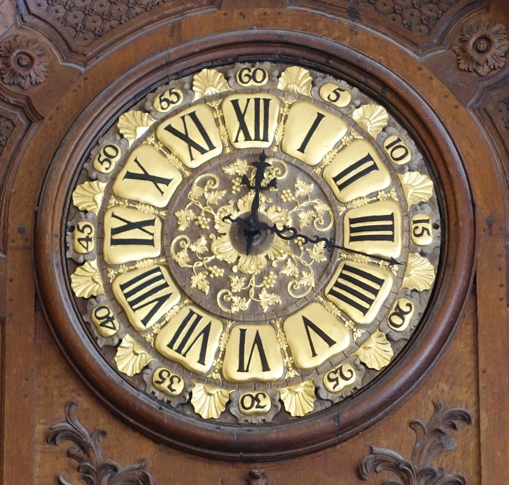 Klok in de Abbay aux Hommes, Caen. Let op het Romeinse cijfer IIII, volgens de gids gebruikt voor de symmetrie ipv. de notatie IV.